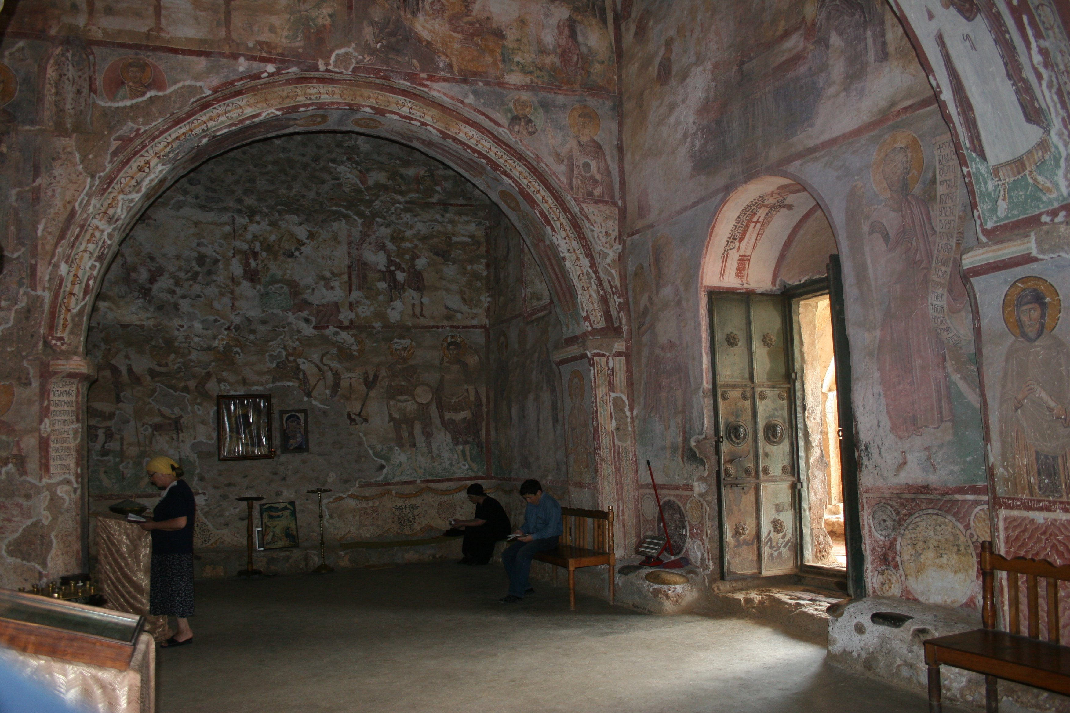 Tsalenjikha Cathedral (interior), Tsalenjikha, Georgia